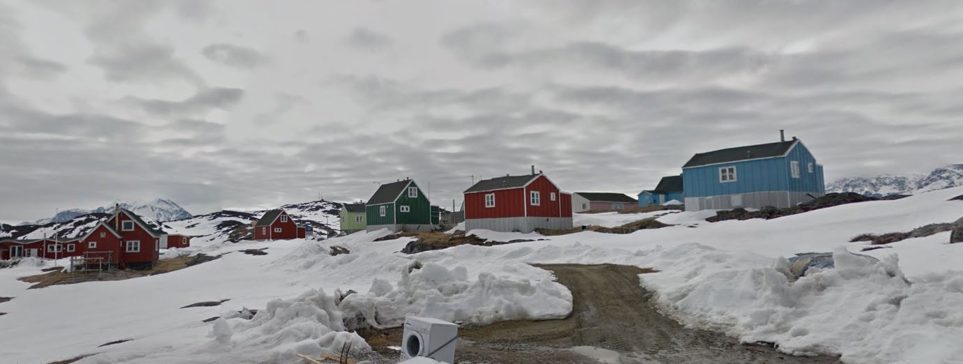 Itilleq